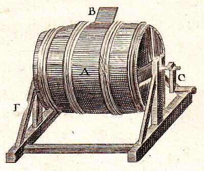 Ausschnitt, die Läutertonne zeigend, aus Handwerkszeug des Kürschners und Fell-Trockenraum. Aus "Encyclopédie, ou dictionaire raisonne des sciences, des arts et des métiers" von Denis Diderot und Jean de Rond d'Alembert, Paris 1762-1777. IV. FOURREUR EXPLICATION Outils. Fig.1. Couteau à habiller. A la lame. B le manche. 2. Gros ciseaux. AA les taillans. BB les anneaux. 3. Forces. AA les taillans. BB le ressort. 4. Carrelets. AAA les tètes. BBB les pointes. C le piquet. 5. Chevalet. A le chevalet. B la gambette. C le piquet. 6. Couteau à ècharner. A la lame. BB les manches. 7. Dégraissoir. A le tonneau. B le couvercle. C la manivelle. DD les supports. 8. Fer de pelletier. A la lame. B les moufles. C le poteau. 9. Banc à tirer les peaux. A la perche. B la moufle. CC les pallissoirs. DD leurs supports. EE, &c. les arcboutans. F la table. GG les treteaux. 10. Claie. 11. Pot de cuivre destiné à faire chauffer les drogues. 12. Élévation perspective de l'étuve à sécher les peaux. AA le poèles. BB, &c. peaux étendues fur des cordes. 13*. Racloire. A la lame. B le manche. 13**. Paumelle.